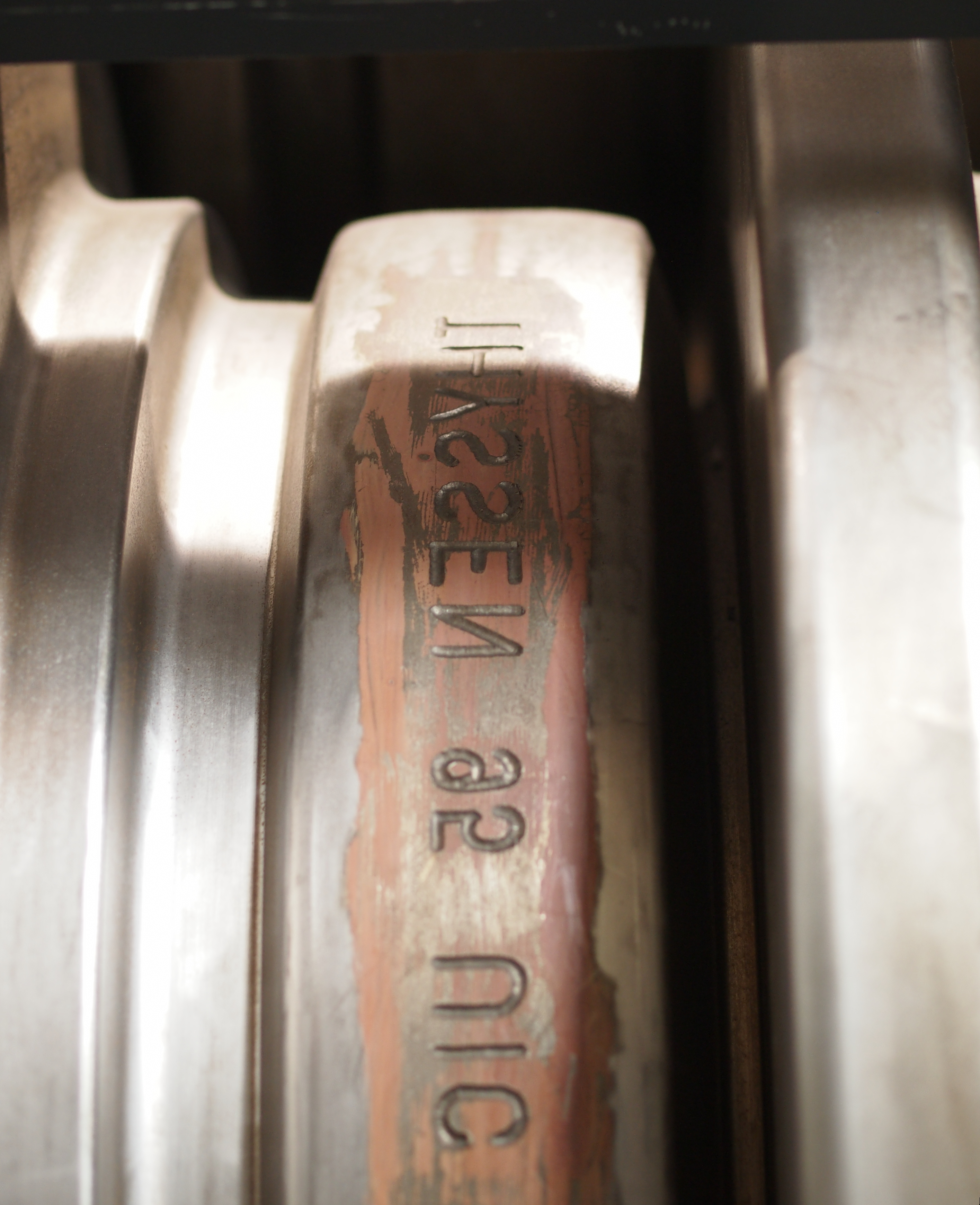 Detail eines Walzengerüstes für Eisenbahnschienen im LVR-Museum Zinkfabrik Altenberg in Duisburg, Walze mit eingefrästem Walzzeichen THYSSEN 95 UIC 60